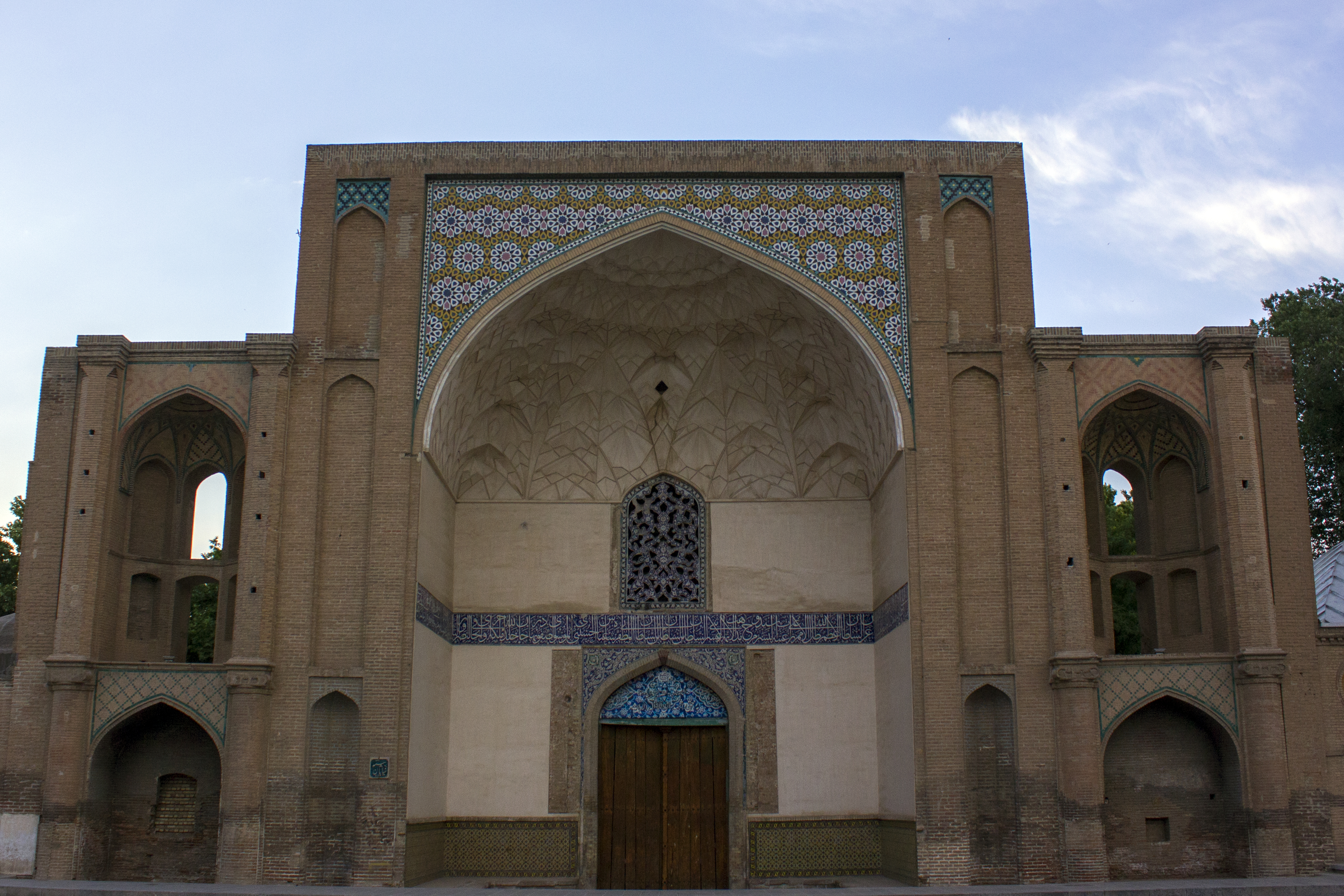 قزوین در دوره شاه تهماسب صفوی، دارای کاخی به نام عالی قاپو بود که اکنون تنها سردر شکوهمند آن باقی مانده است.